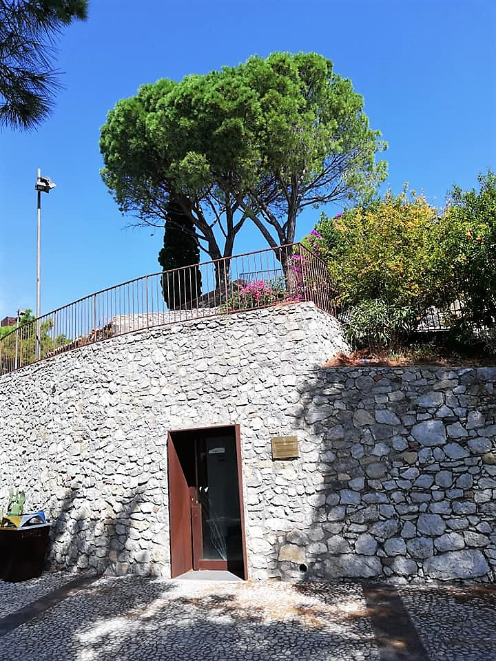 Ambienti e manufatti a mezzogiorno su livello inferiore.